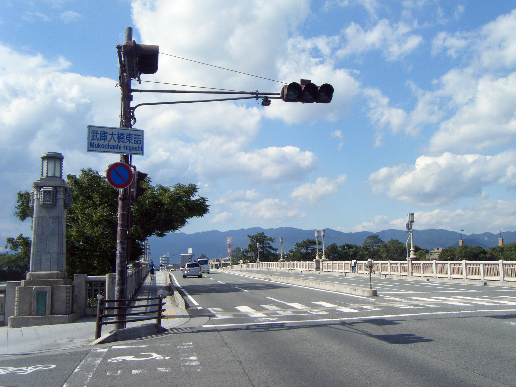 国道2号・武庫大橋東詰